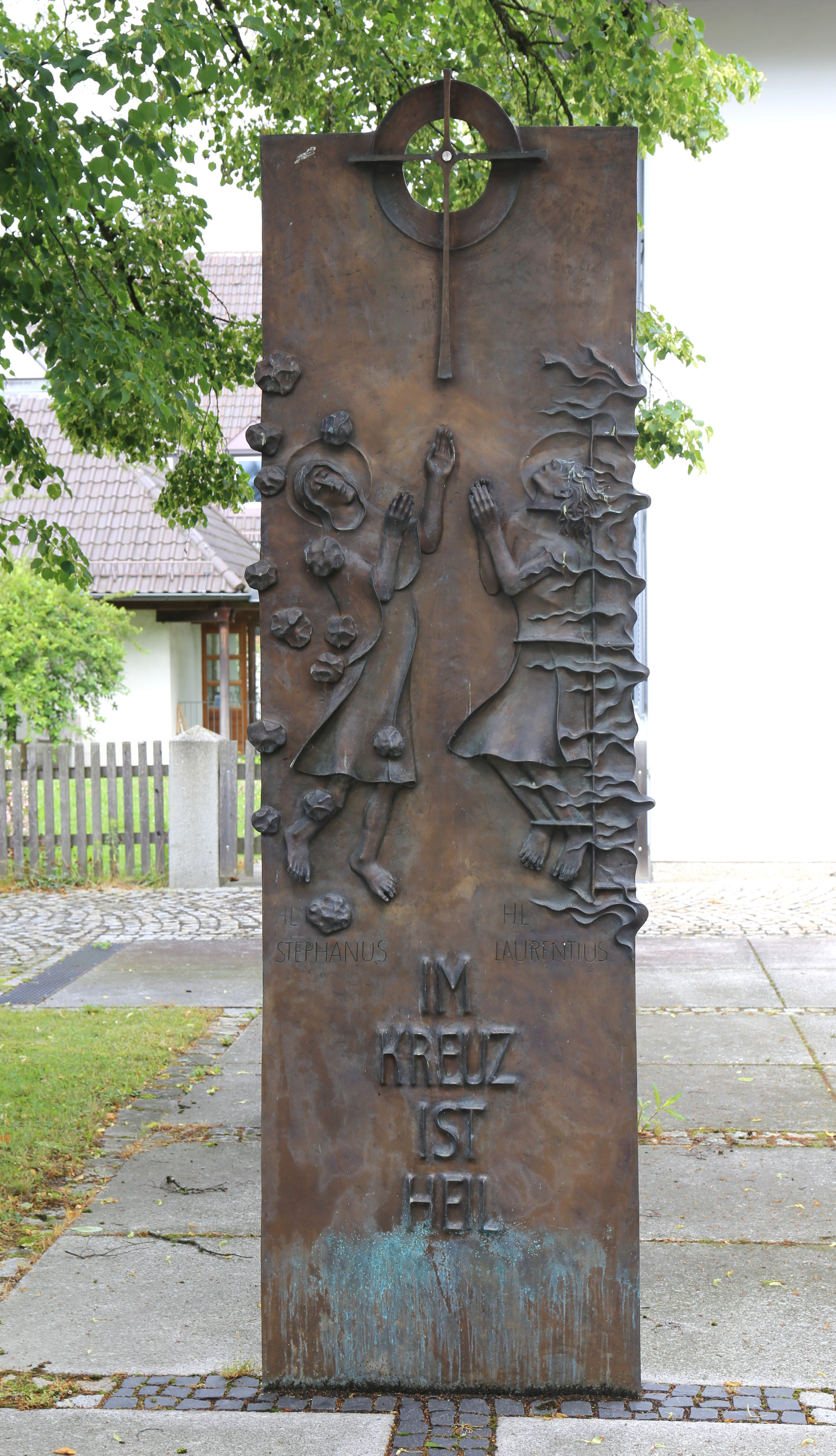 Josef Hamberger: Relief der Heiligen Stephanus und Laurentius bei der Pfarrkirche Hl. Kreuz in Raubling, 2010, Bronze, Höhe: 2,3 Meter